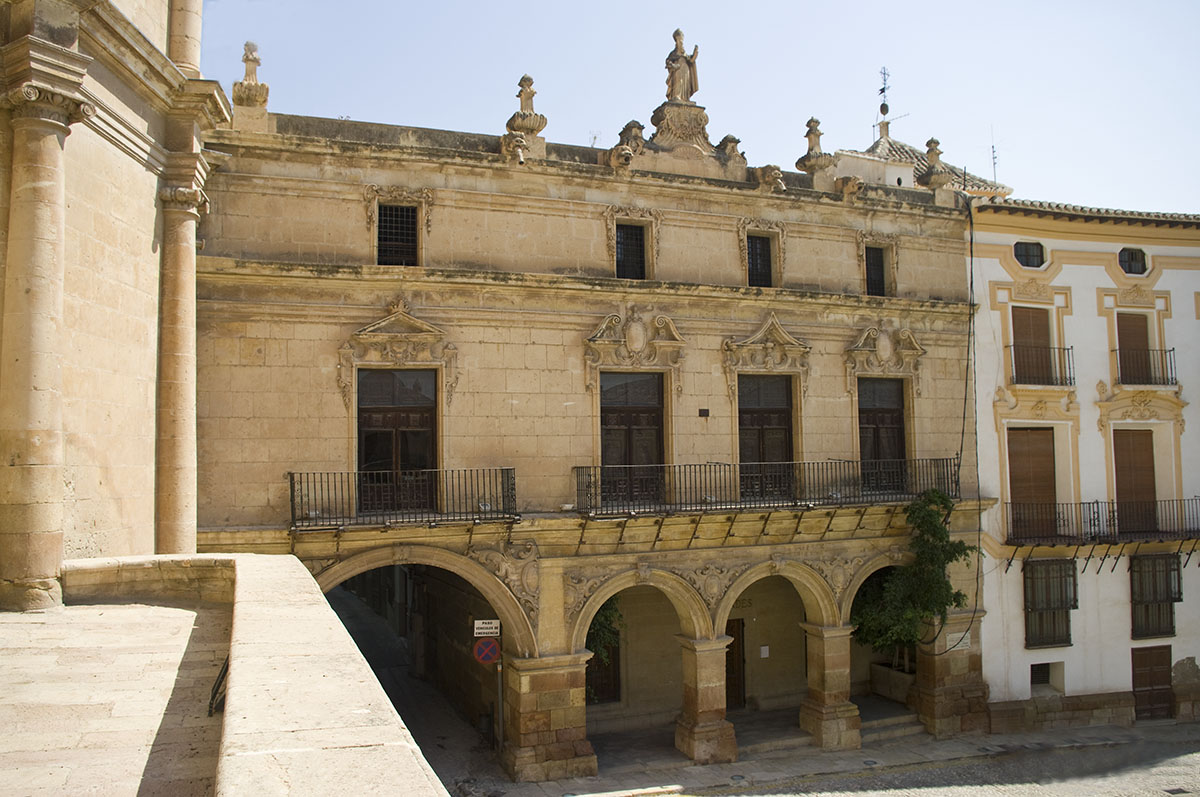 Salas Capitulares de la Colegiata de San Patricio de Lorca (Murcia)